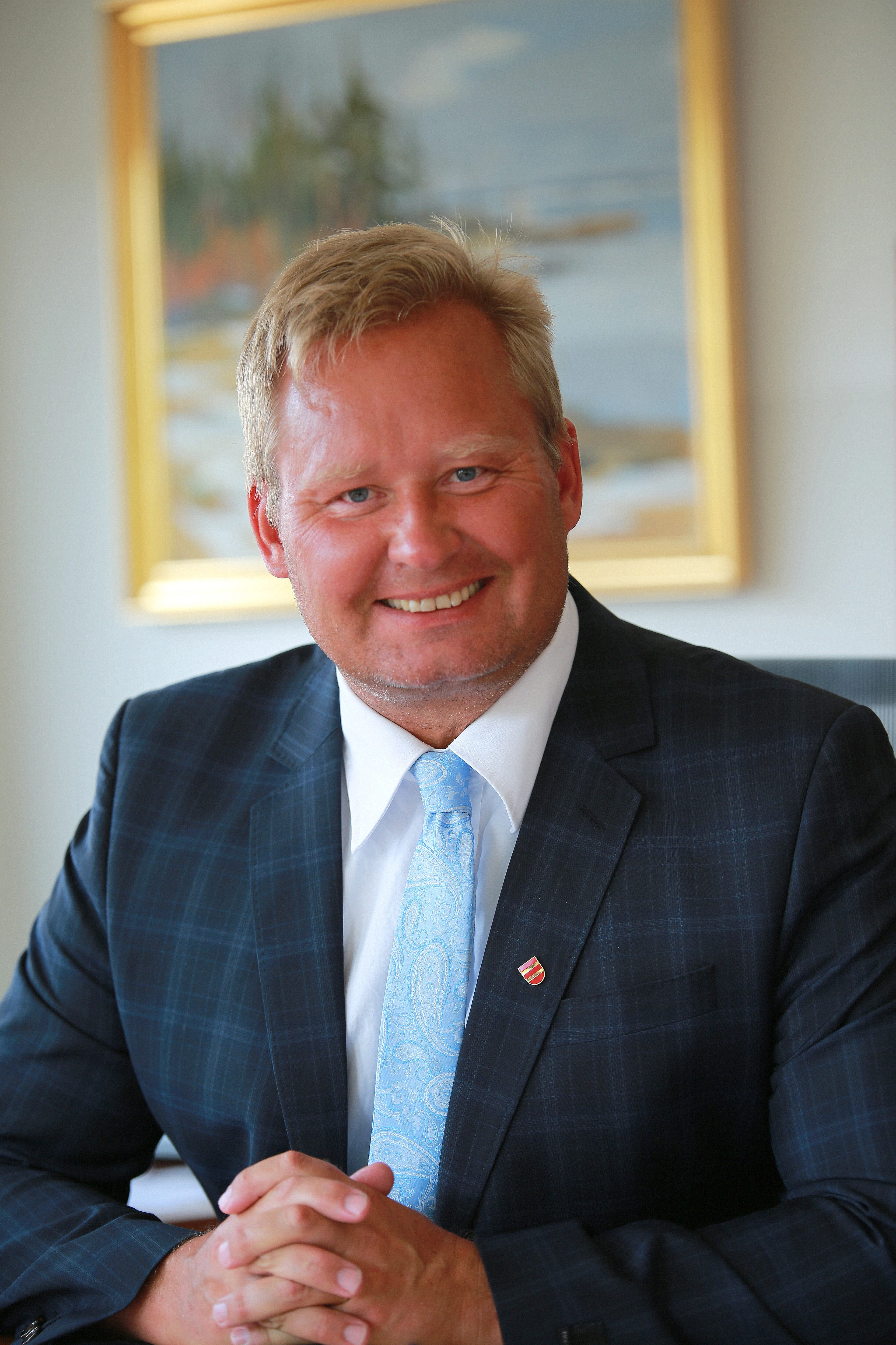 Bjørgulv Sverdrup Lund. Fylkesordfører 2011 - 2015 Foto: Jan Aabøe, AAFK